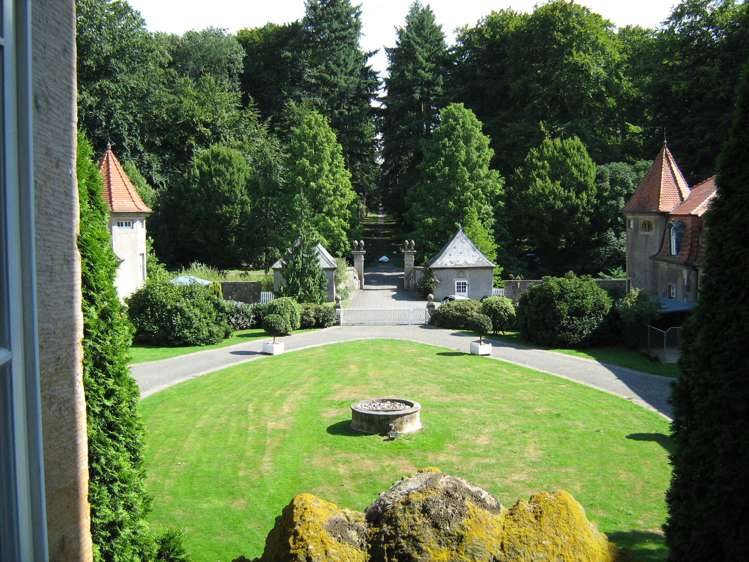 Innenhof von Gut Leye 2008 in Atter bei Osnabrück